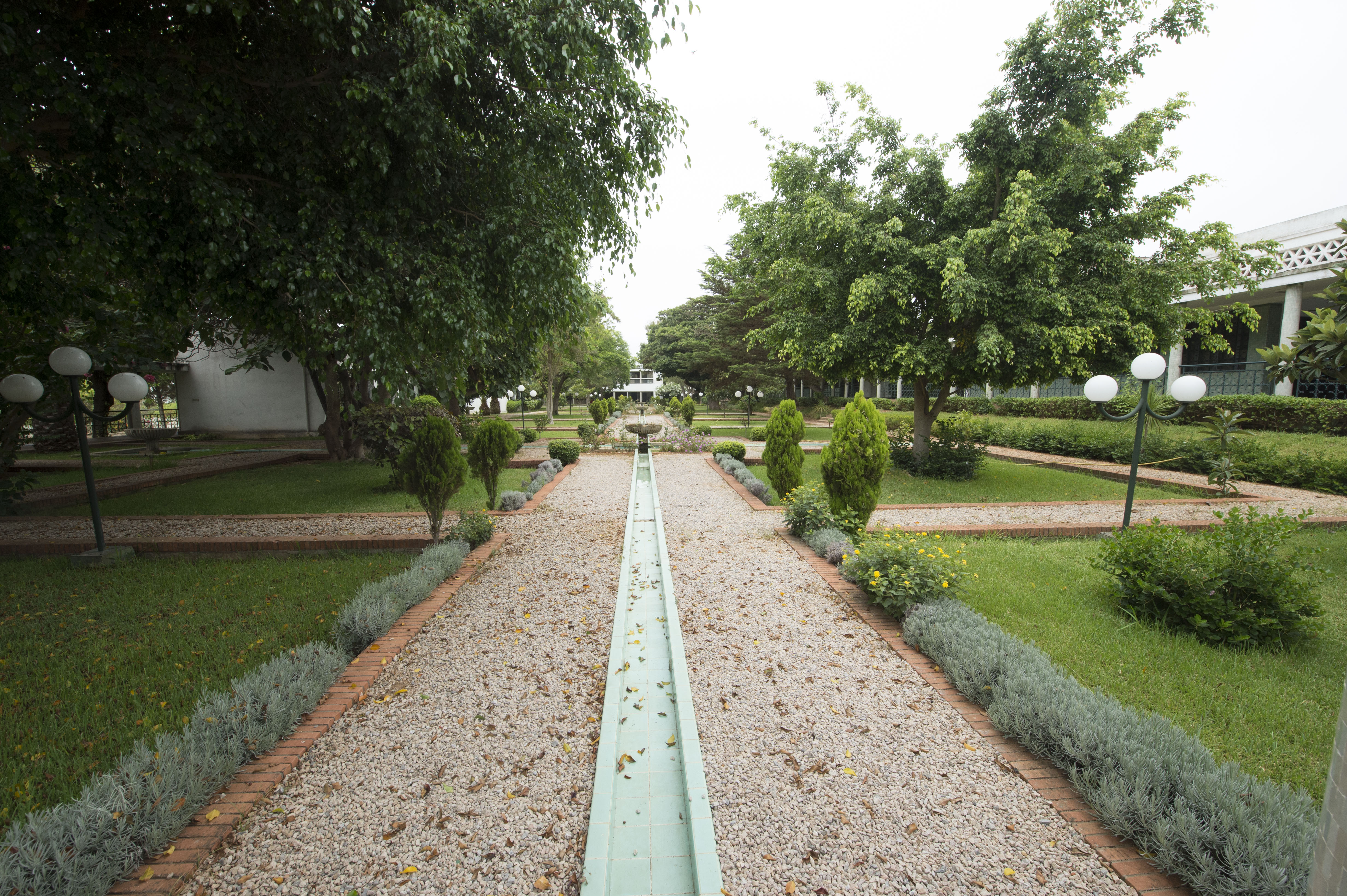 Le jardin de l’École Nationale Supérieure de l'Administration - Rabat Maroc